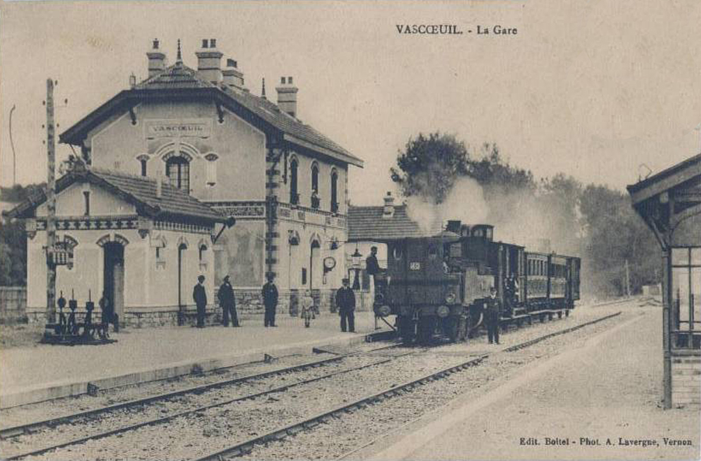 La gare de Vascœuil au début du XXème siècle